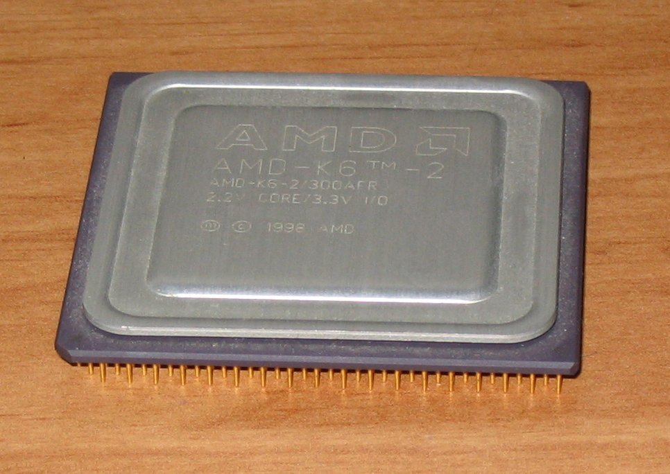 AMD-K6-2 300AFR microprocesseur Photo prise par Utilisateur:BernardM.